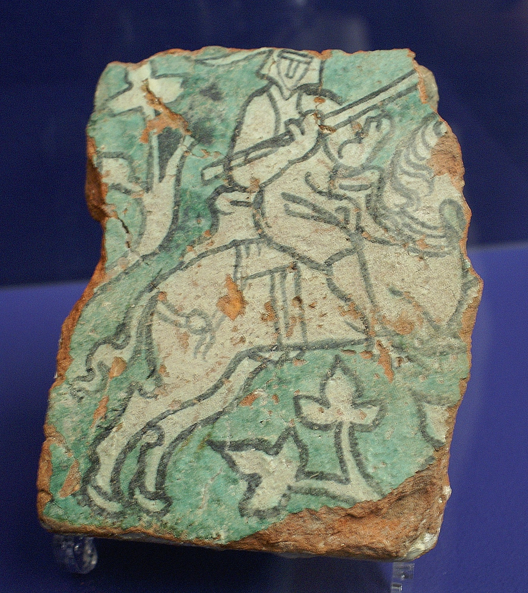 Scherbe vom Grab Papst Benedikt V. in Hamburg Terracotta, vermutlich Frankreich, 13. Jh., Ausstellungsstück im Museum für Hamburgische Geschichte